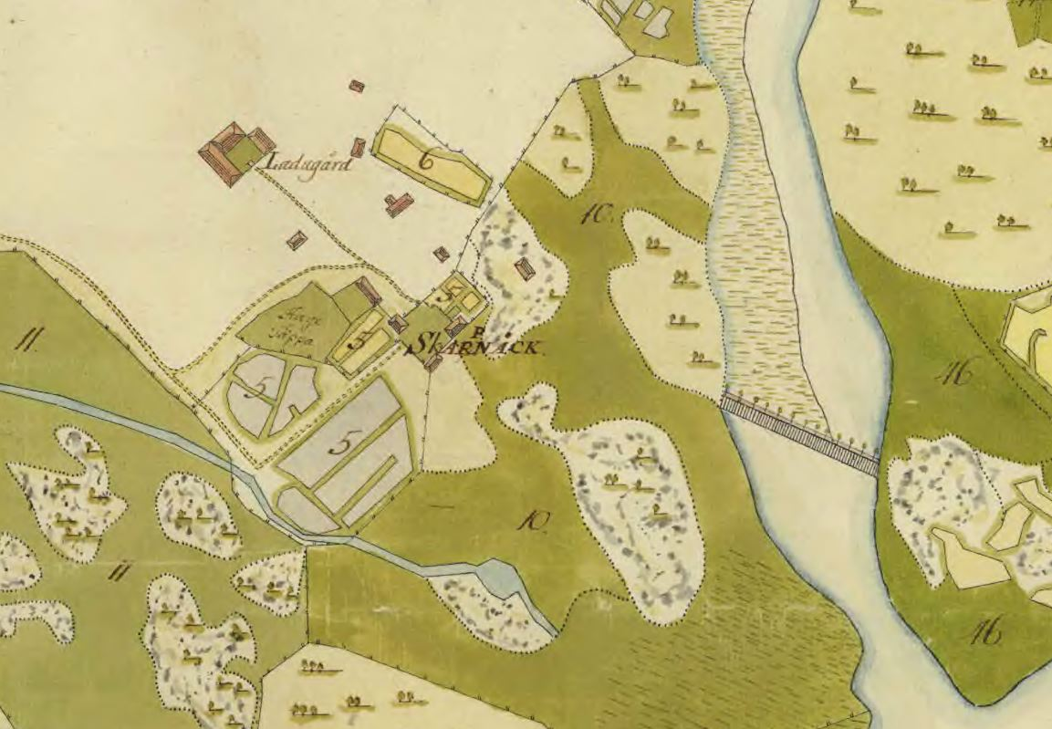 Del av lantmätare Bodings karta över Skarpnäck 1756 visande herrgården